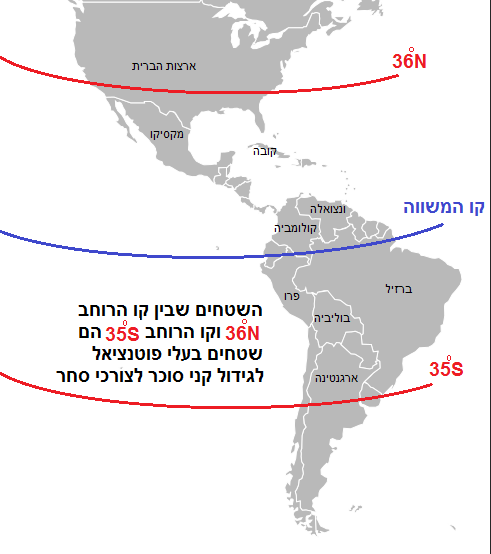 שטחים בעולם החדש בעלי פוטנציאל לגידול קנה סוכר לצורכי סחר